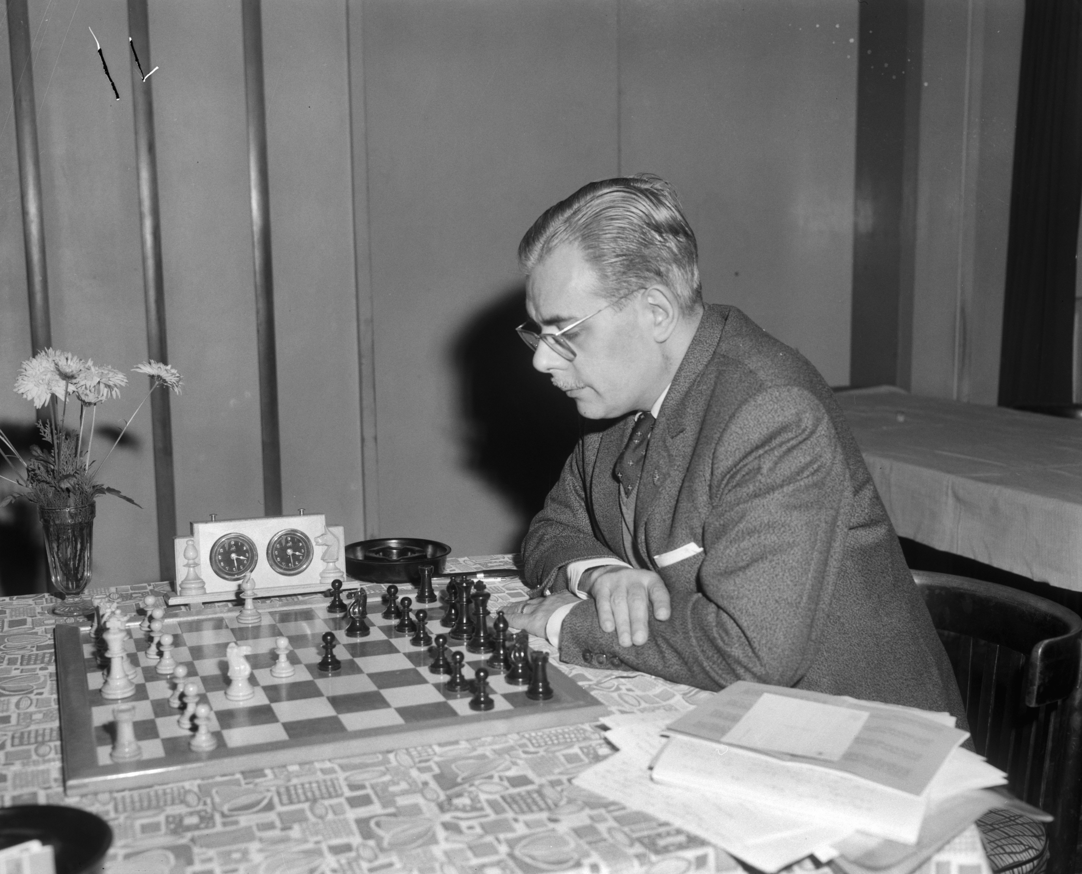 Collectie / Archief : Fotocollectie Anefo Reportage / Serie : [ onbekend ] Beschrijving : Hoogovenschaaktoernooi gestart. Antonio Medina García (1965) Datum : 6 januari 1965 Trefwoorden : schaken Instellingsnaam : Hoogovenschaaktournooi Fotograaf : Bilsen, Joop van / Anefo Auteursrechthebbende : Nationaal Archief Materiaalsoort : Negatief (zwart/wit) Nummer archiefinventaris : bekijk toegang 2.24.01.04 Bestanddeelnummer : 917-3117